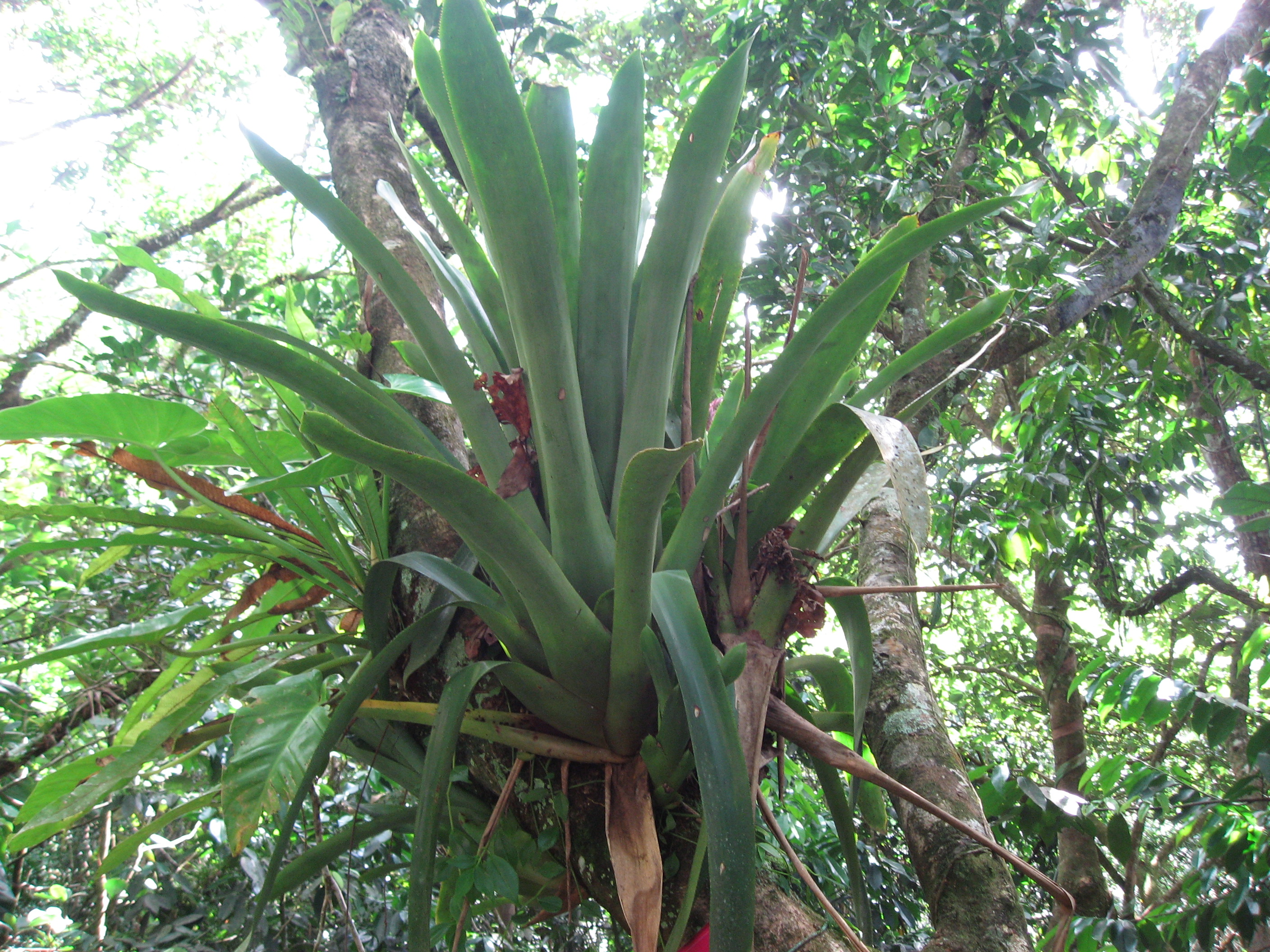 Glomeropitcairnia penduliflora au Parc des Mamelles en Guadeloupe, Basse-Terre